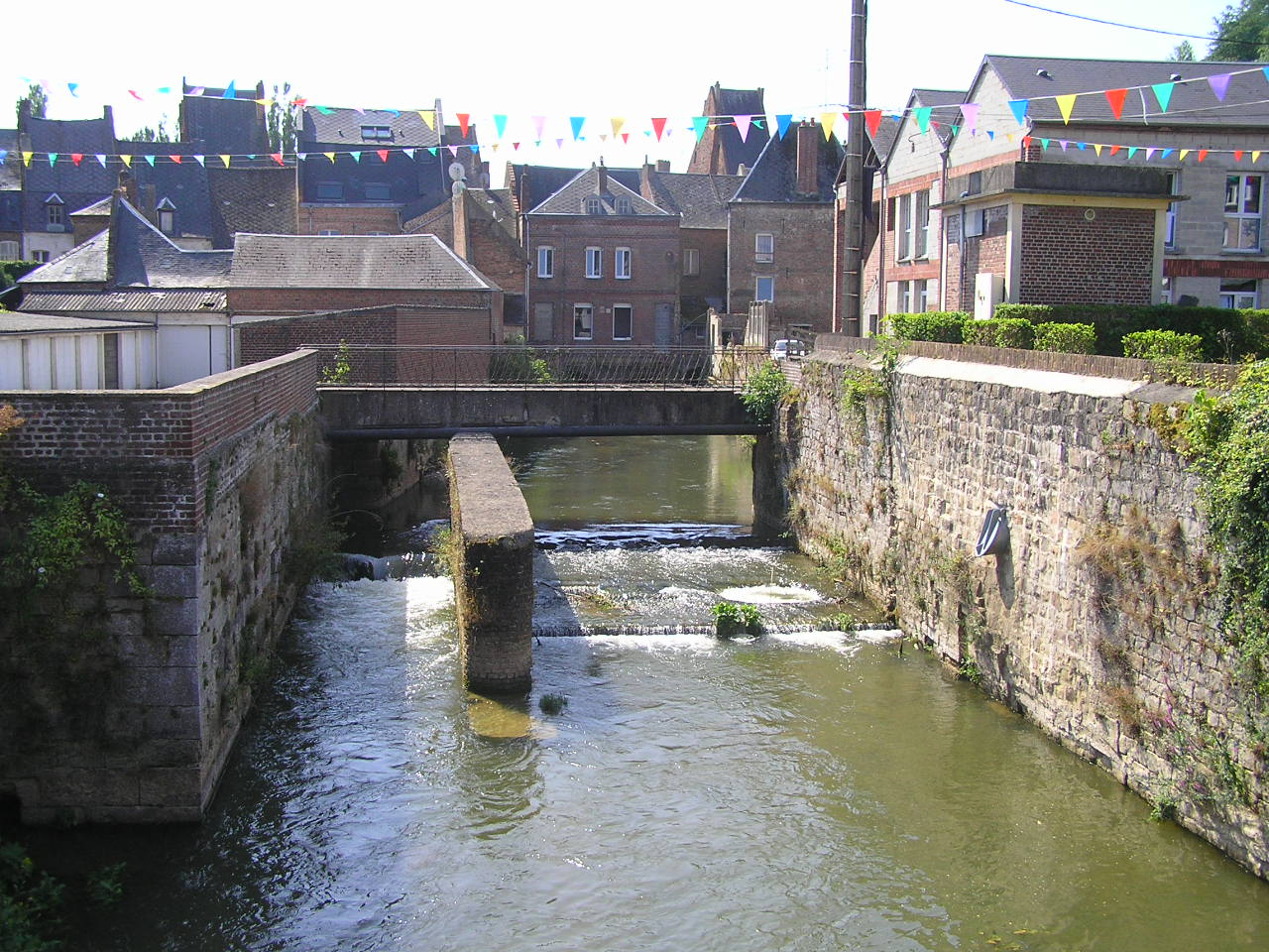 Guise , dans l'Aisne, en Picardie (France) (traversée par l' Oise). On remarque : . (A la date de l'import depuis Flickr par Marc ROUSSEL, l'auteur avait légendé sa photo ainsi : "....")